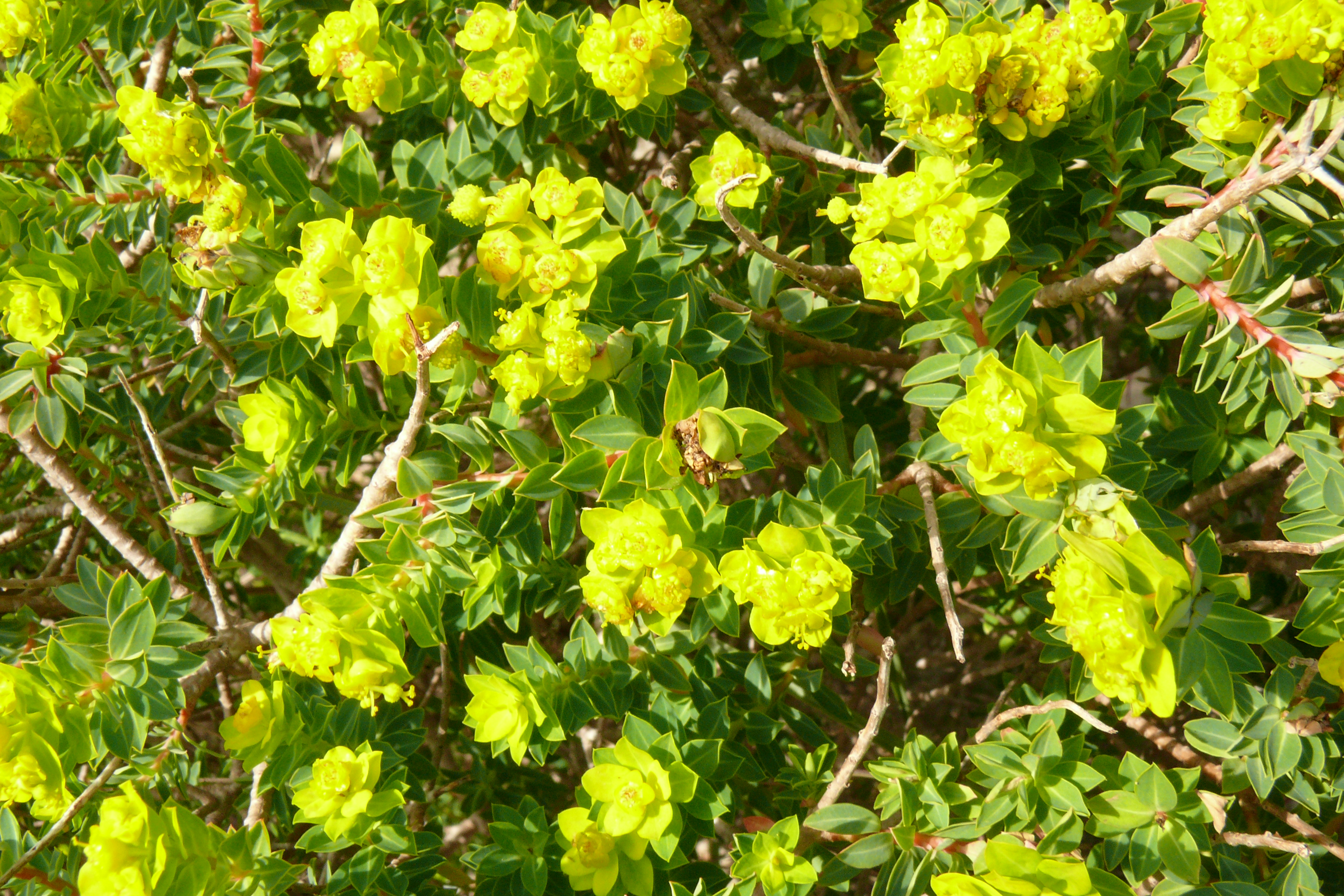 Euphorbia melitensis, endemisch auf Malta